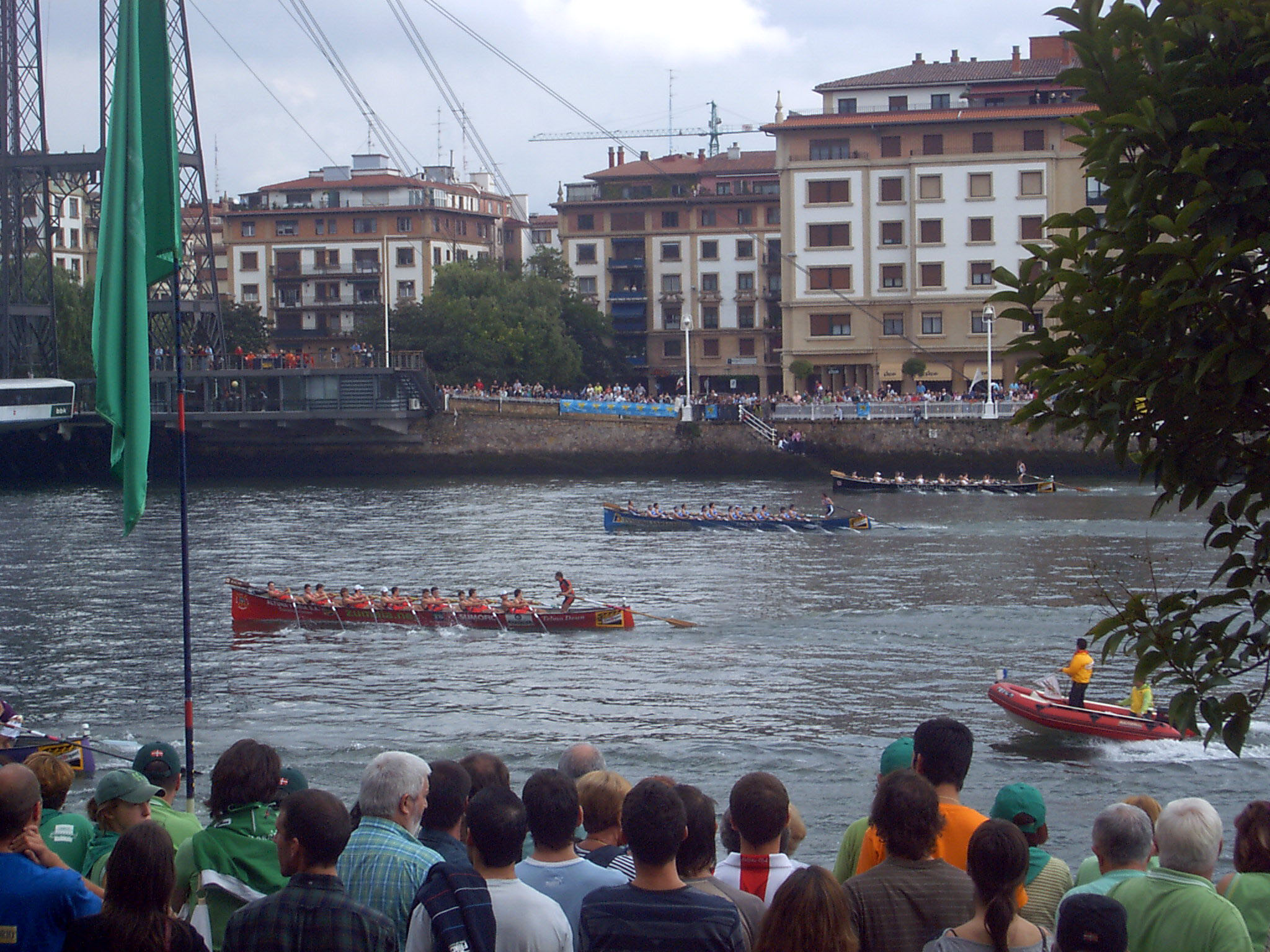 Portugaleteko Bandera.